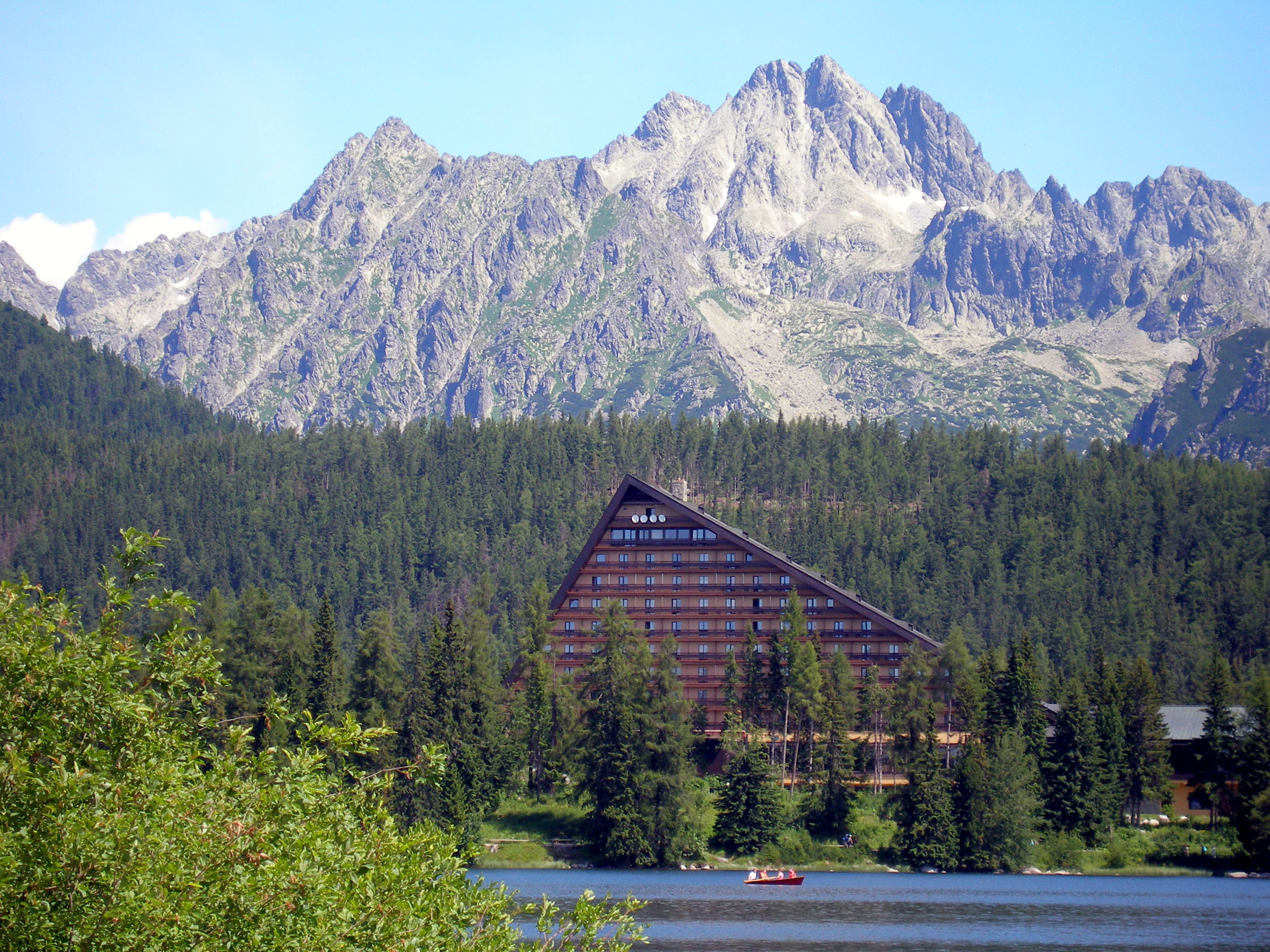 Horské pleso v tatranskej osade Štrbské Pleso. Okres Poprad.